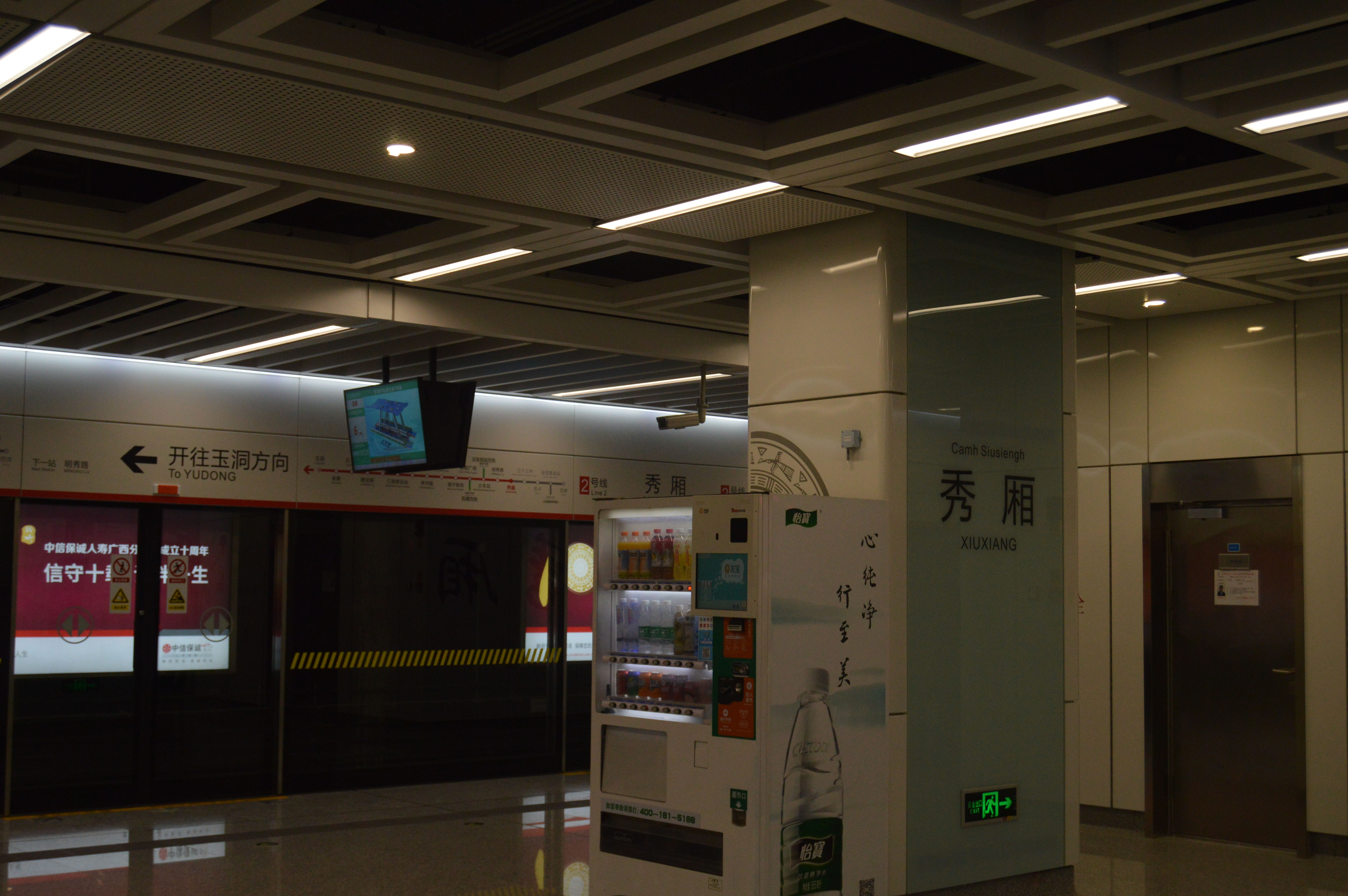 南宁地铁二号线 秀厢站车站